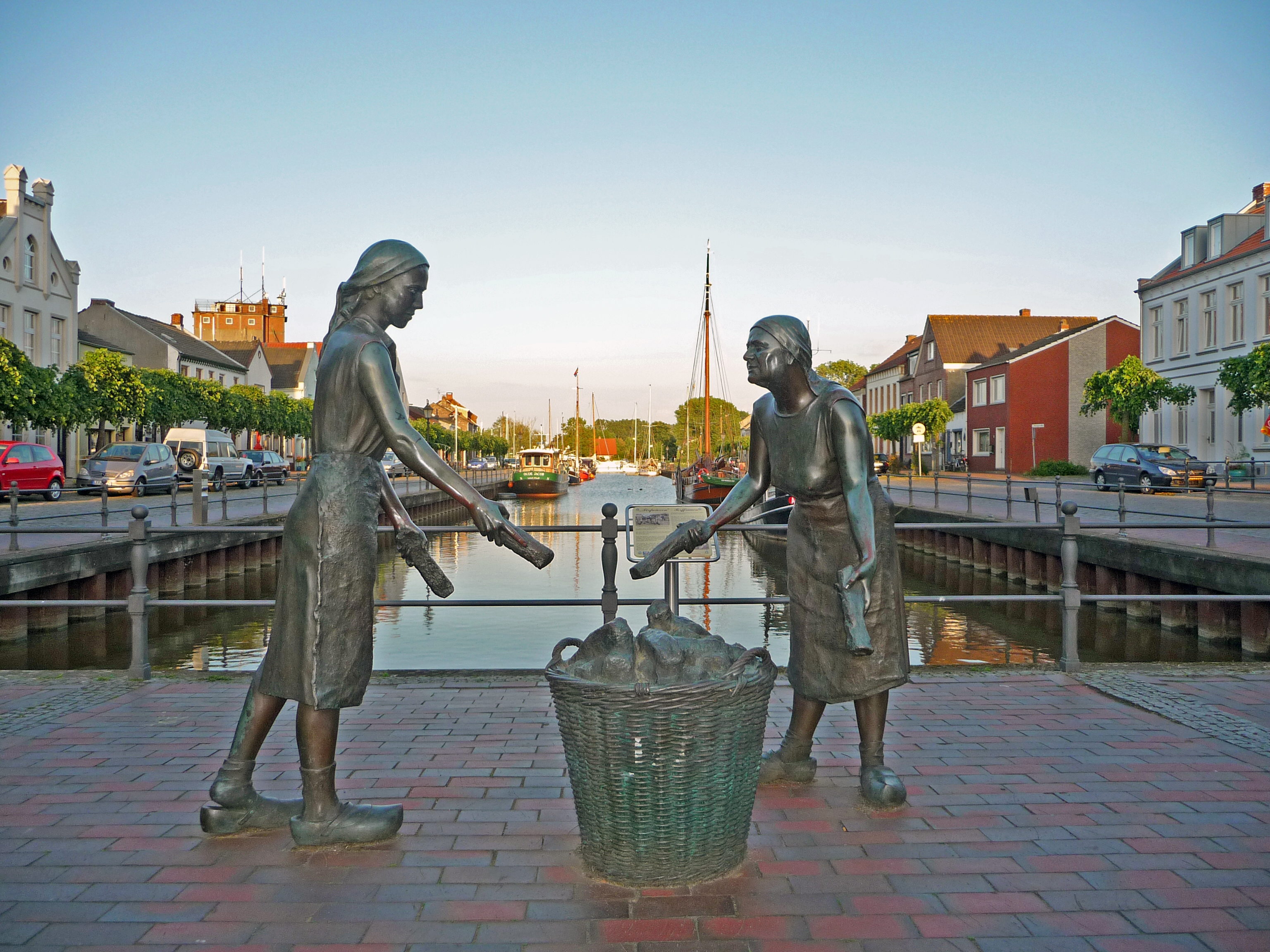 "Torfwieven" in Weener am Alten Hafen